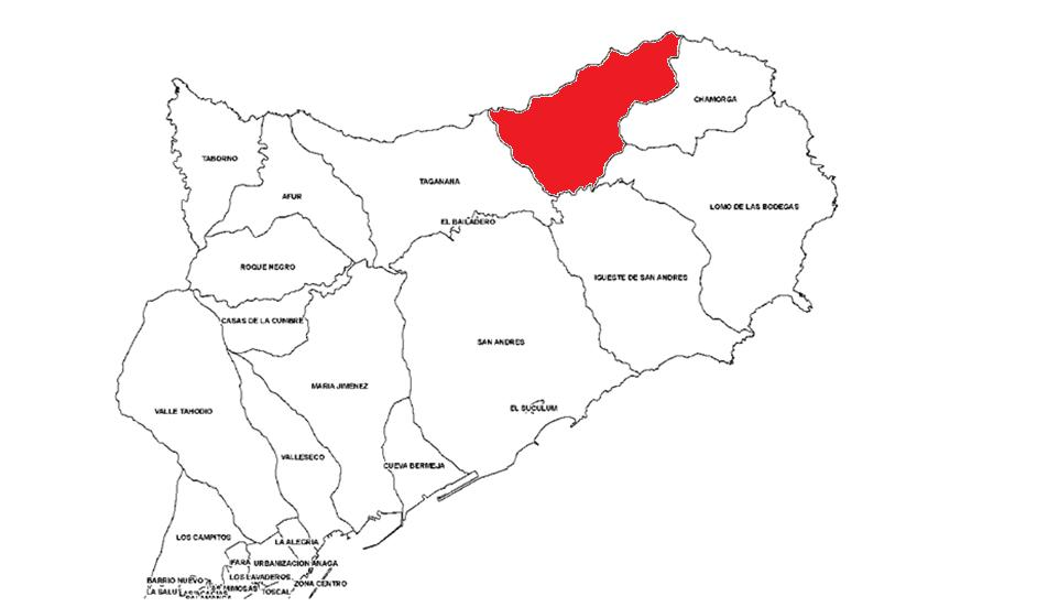 Localización de Almaciga